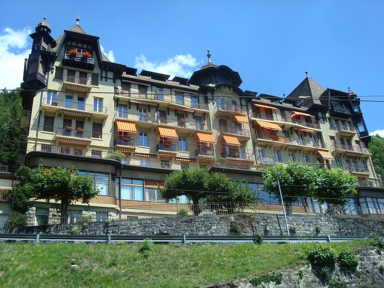 Ehemaliges Hôtel des Narcisses an der Rte de Villard 2, unmittelbar oberhalb des Keilbahnhofes Chamby der Montreux–Berner Oberland-Bahn (MOB) und der Museumsbahn Blonay–Chamby (BC) im August 2010. Im ehemaligen Hotel befinden sich Heute, Stand 2010, Miet- und Eigentumswohnungen[1] (Luxus Appartements).